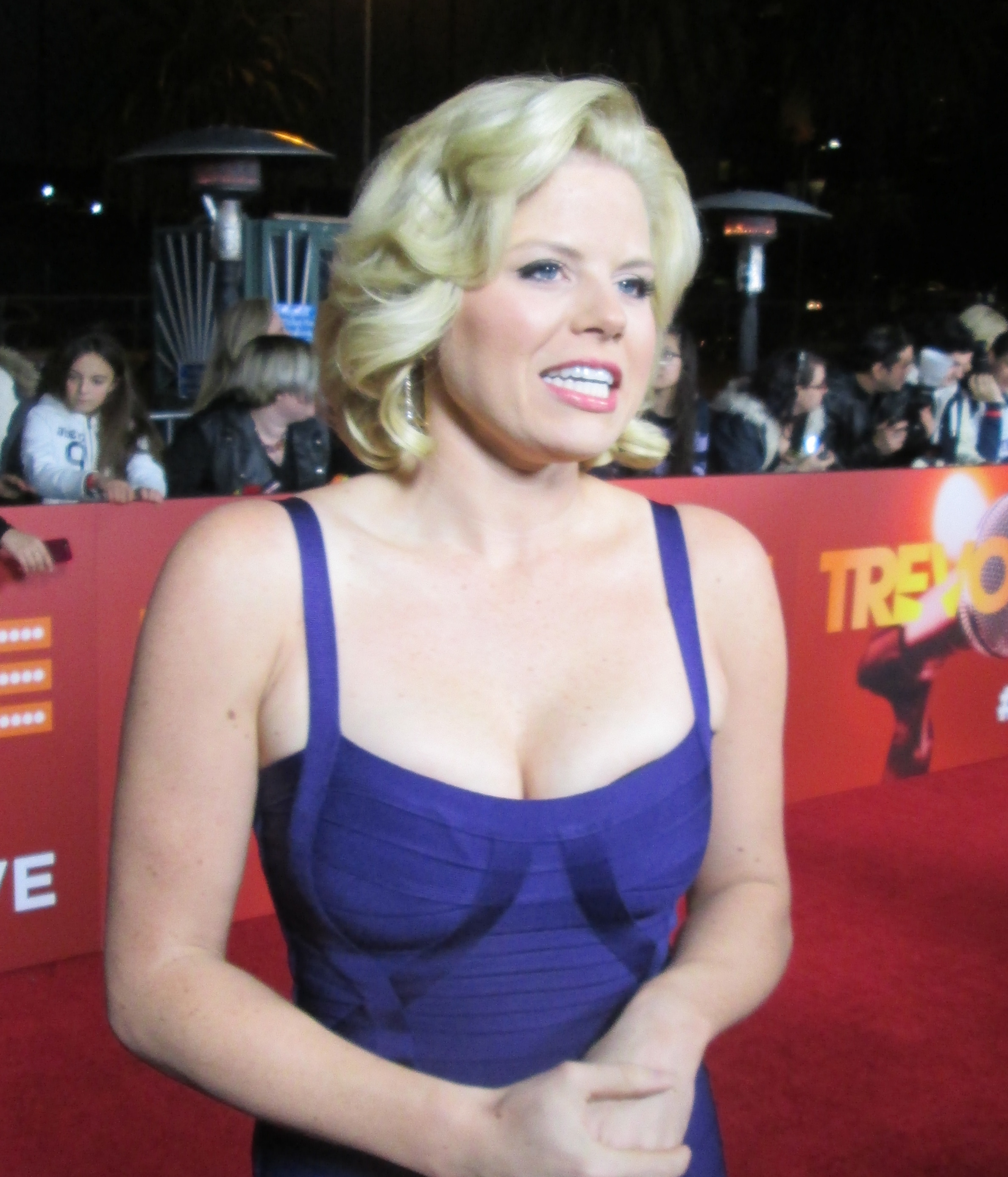 Megan Hilty